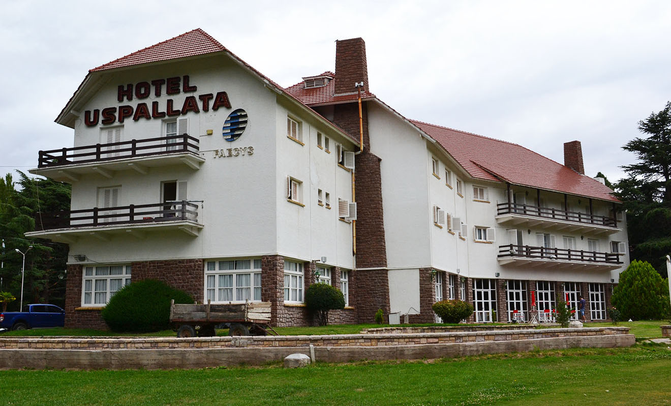 Vista del hotel uspallata en la actualidad